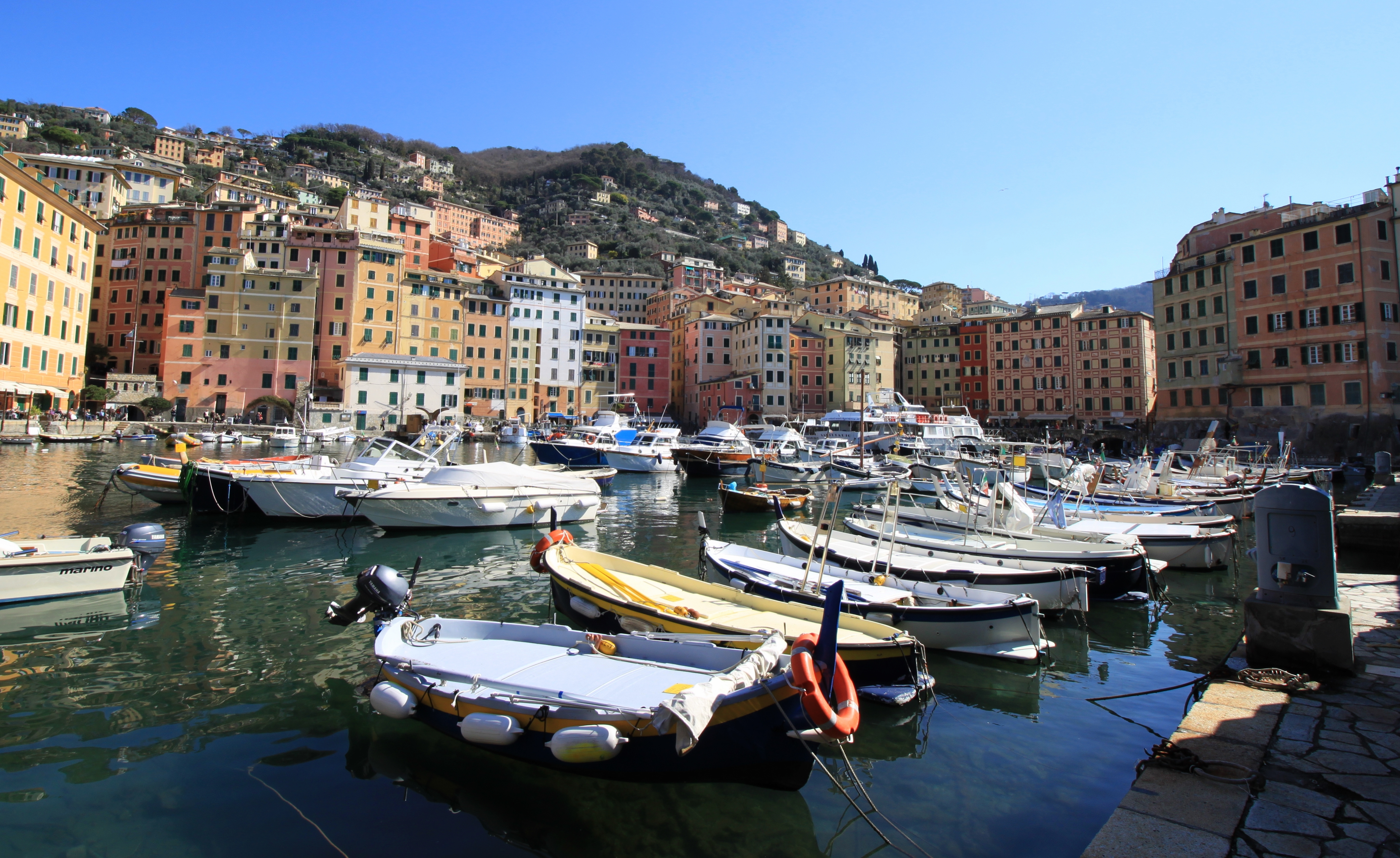 Porticciolo di Camogli